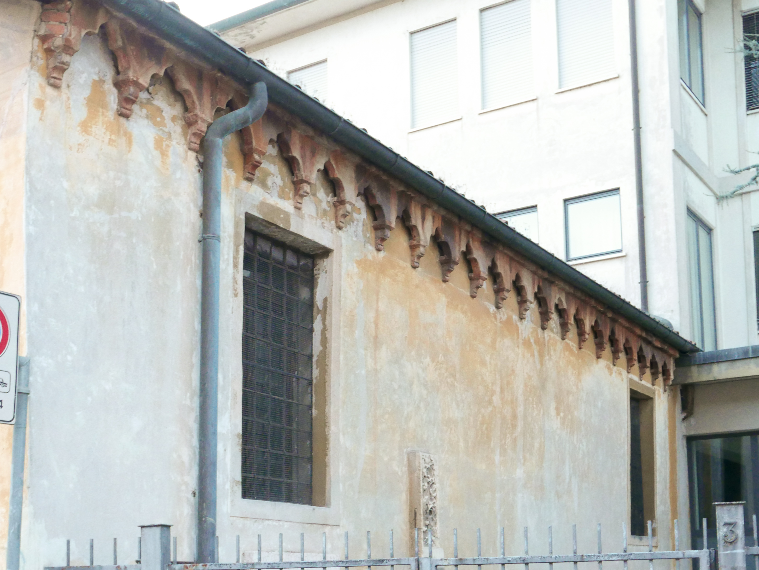 Fianco est